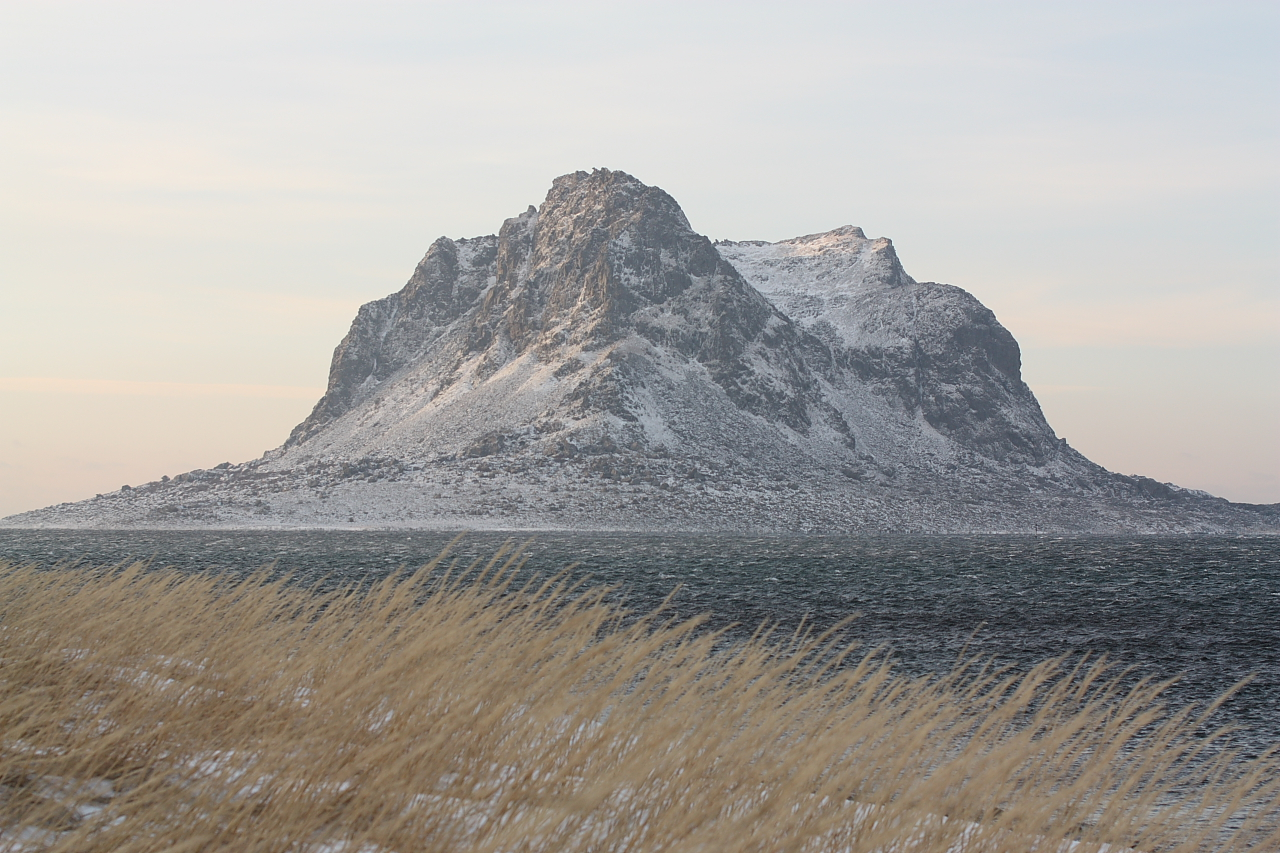 Søla